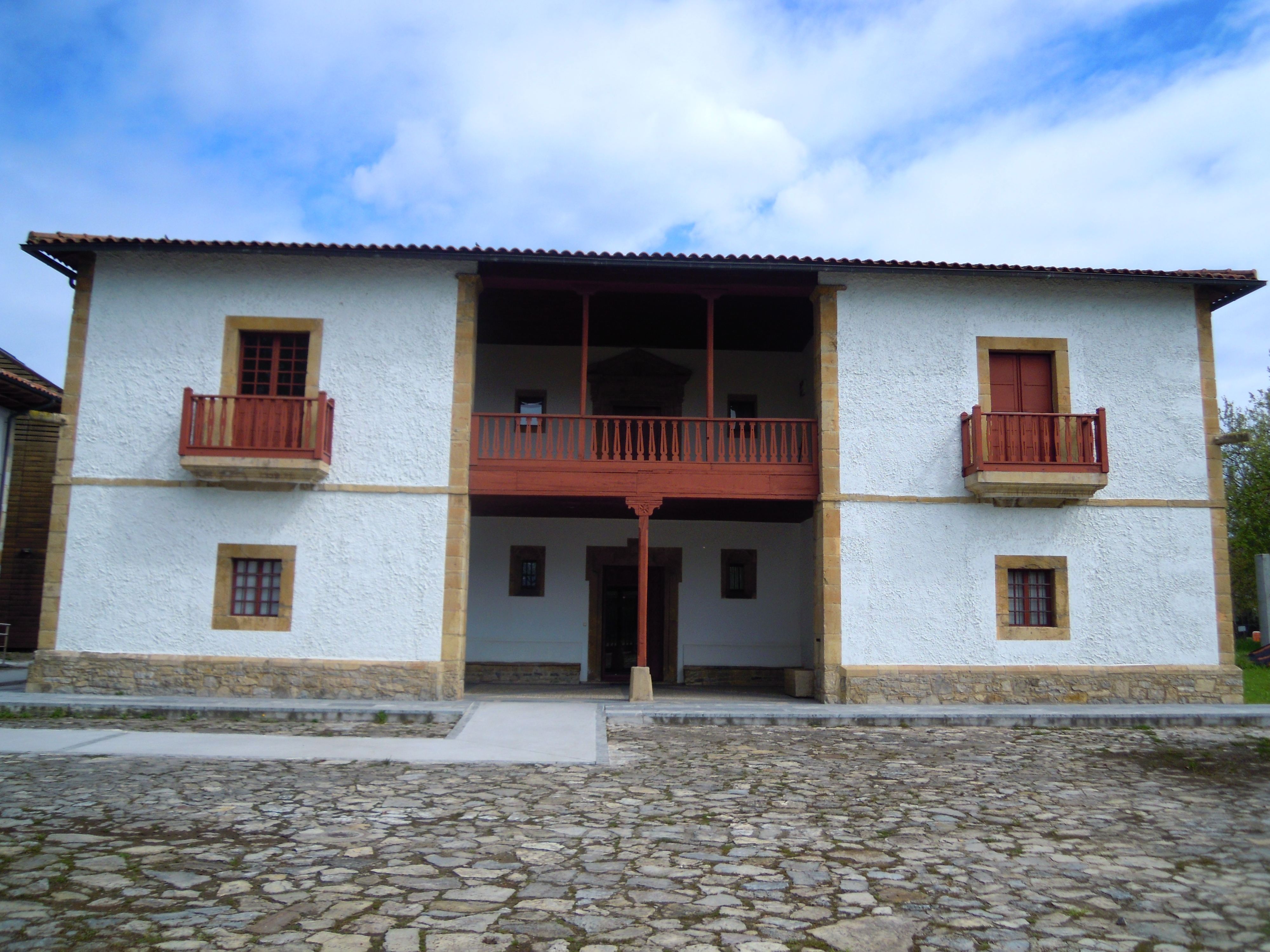 Muséu del Pueblu d'Asturies